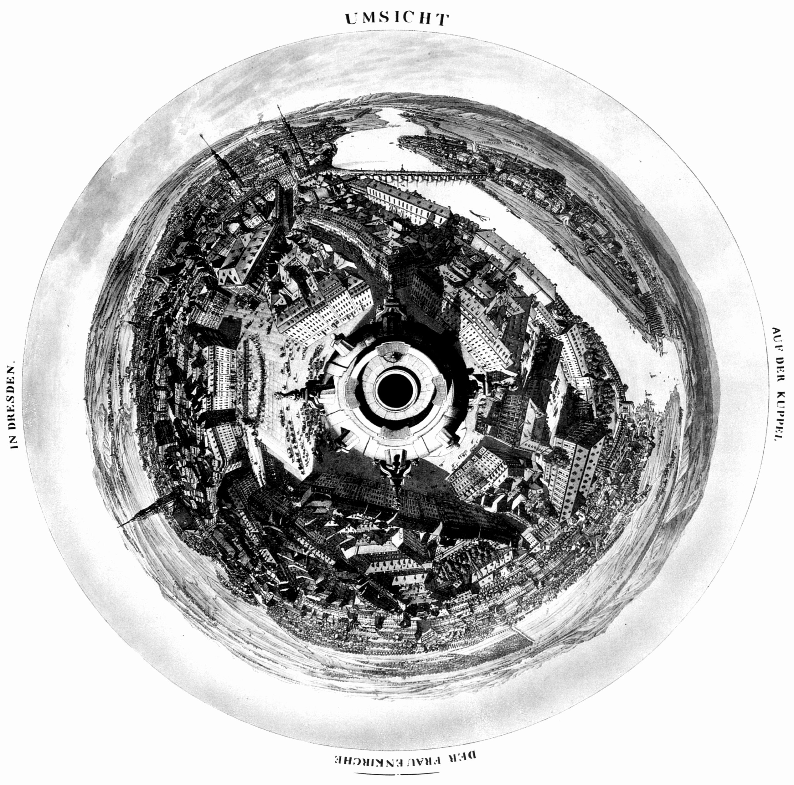 Panorama von der Kuppel der Frauenkirche aus